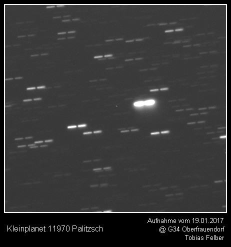 Aufnahme des Kleinplaneten 11970 Palitzsch vom 19.Januar 2017 Summe aus 20 Einzelbildern zu je 15 sek. Belichtung Die Helligkeit des Kleinplaneten lag zu der Zeit bei 18,4 mag